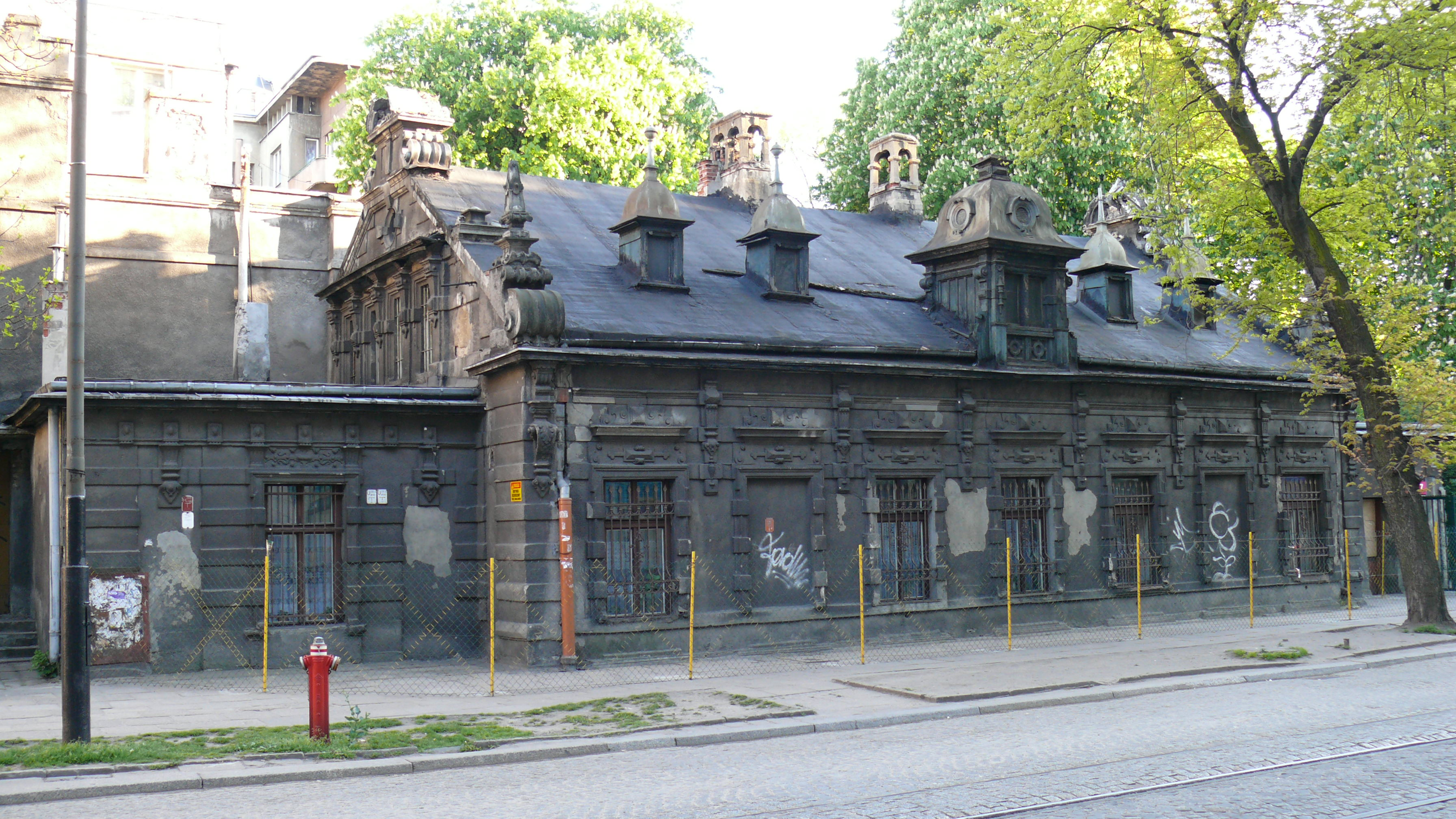 Budynek przy ul. Tuwima 17 w Łodzi, dom Otto Gehliga